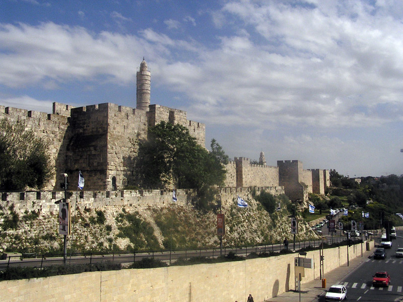 Palais de David